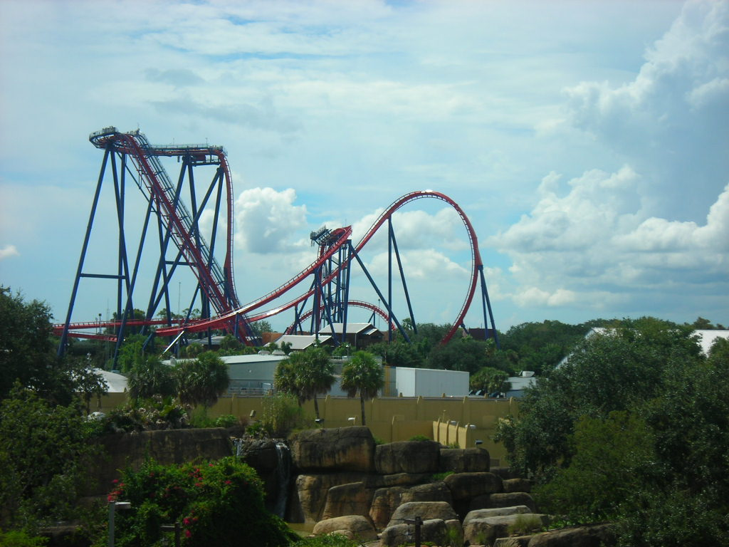 Sheikra at Busch Gardens Africa